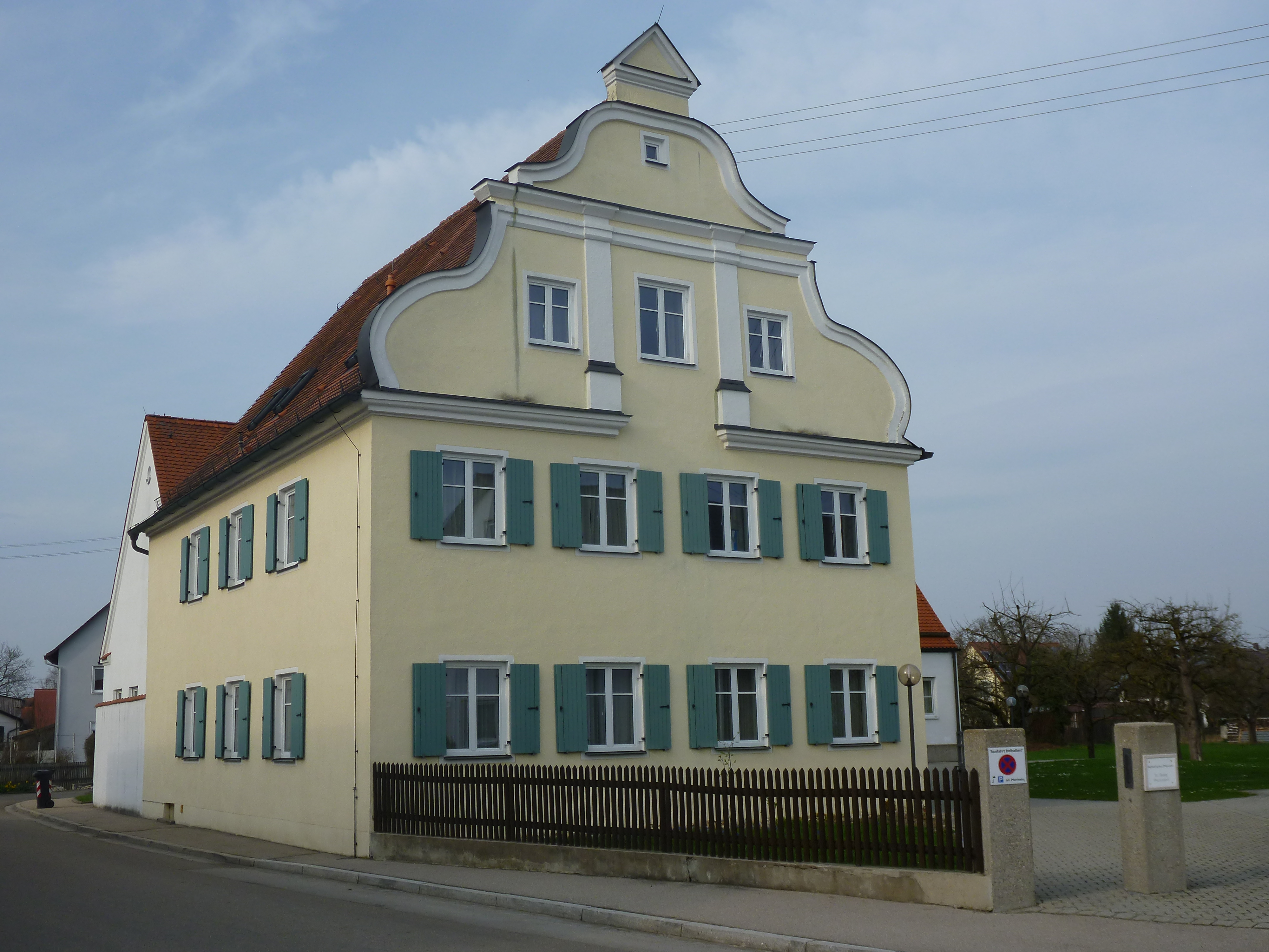 Pfarrhaus Westendorf, barocker Bau mit Schweifgiebeln, um 1700, erneuert um 1760; Pfarrstadel, 1796.